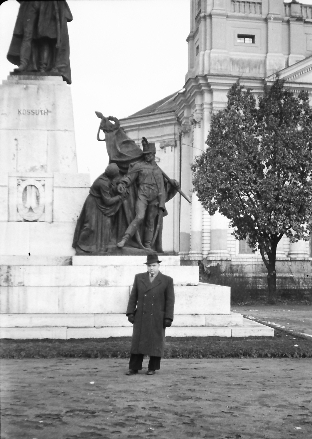 Kossuth tér, Kossuth-szoborcsoport és a Református Nagytemplom. Location: Hungary, Debrecen Title: Kossuth tér, Kossuth-szoborcsoport és a Református Nagytemplom.